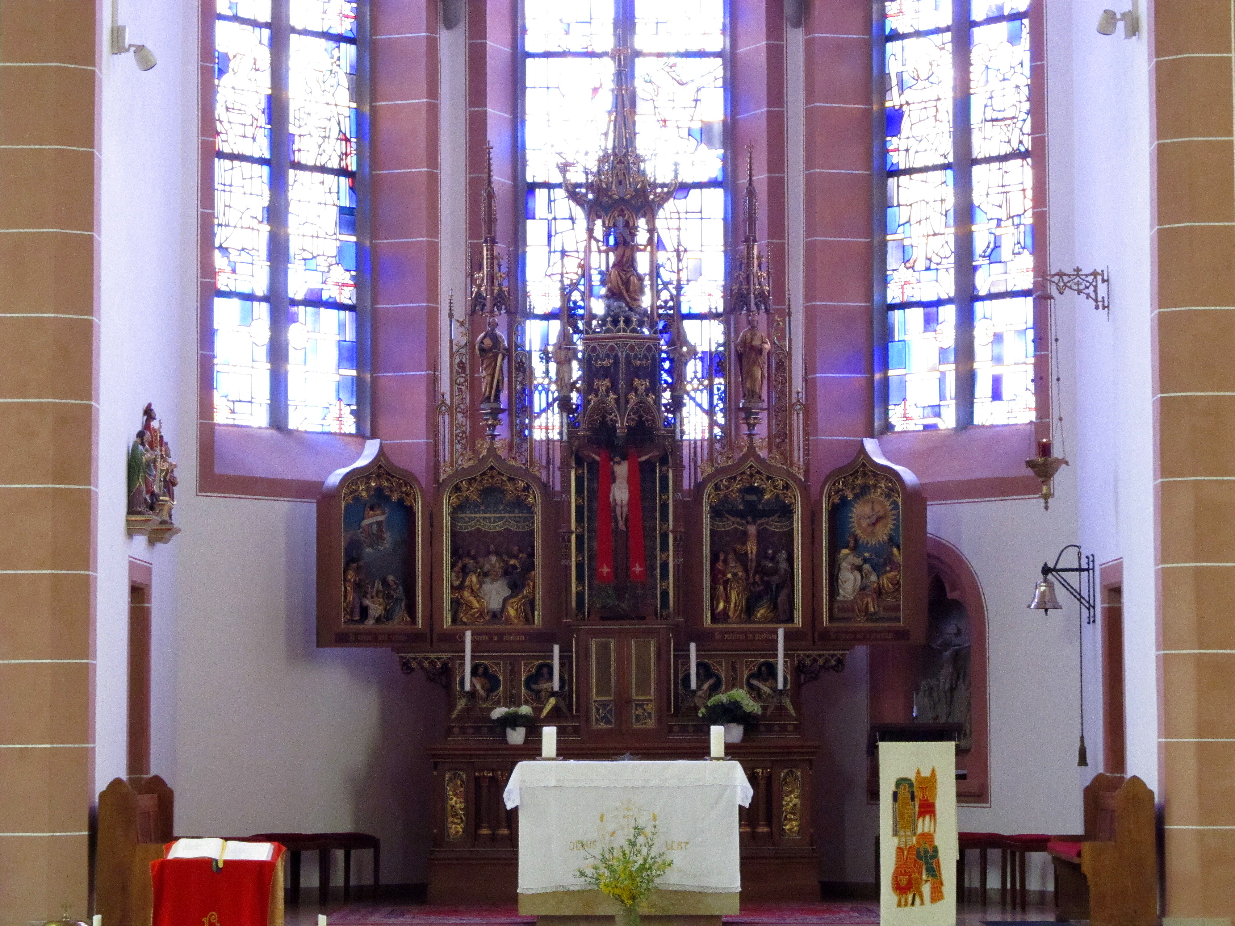 Hochaltar der katholischen Pfarrkirche St. Martin in Schiffweiler, Landkreis Neunkirchen, Saarland